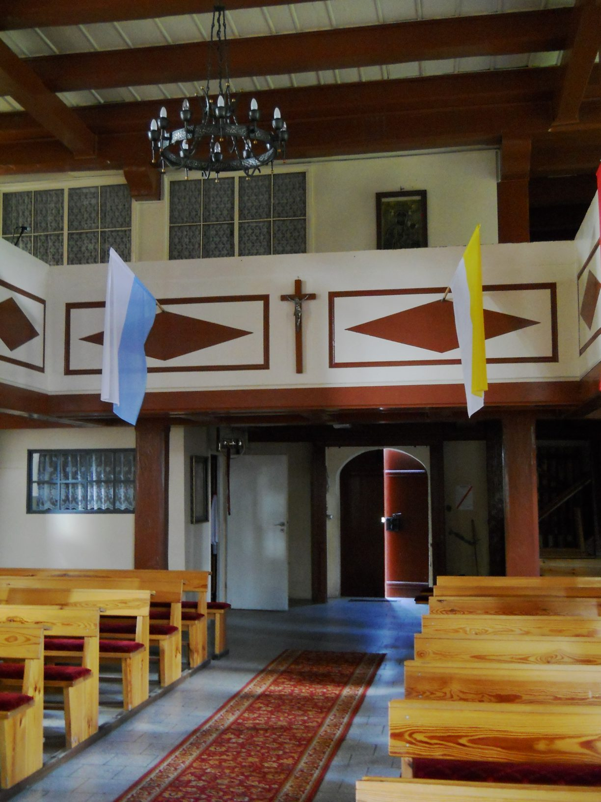 Kościół w Wojcieszycach. Empora organowa.